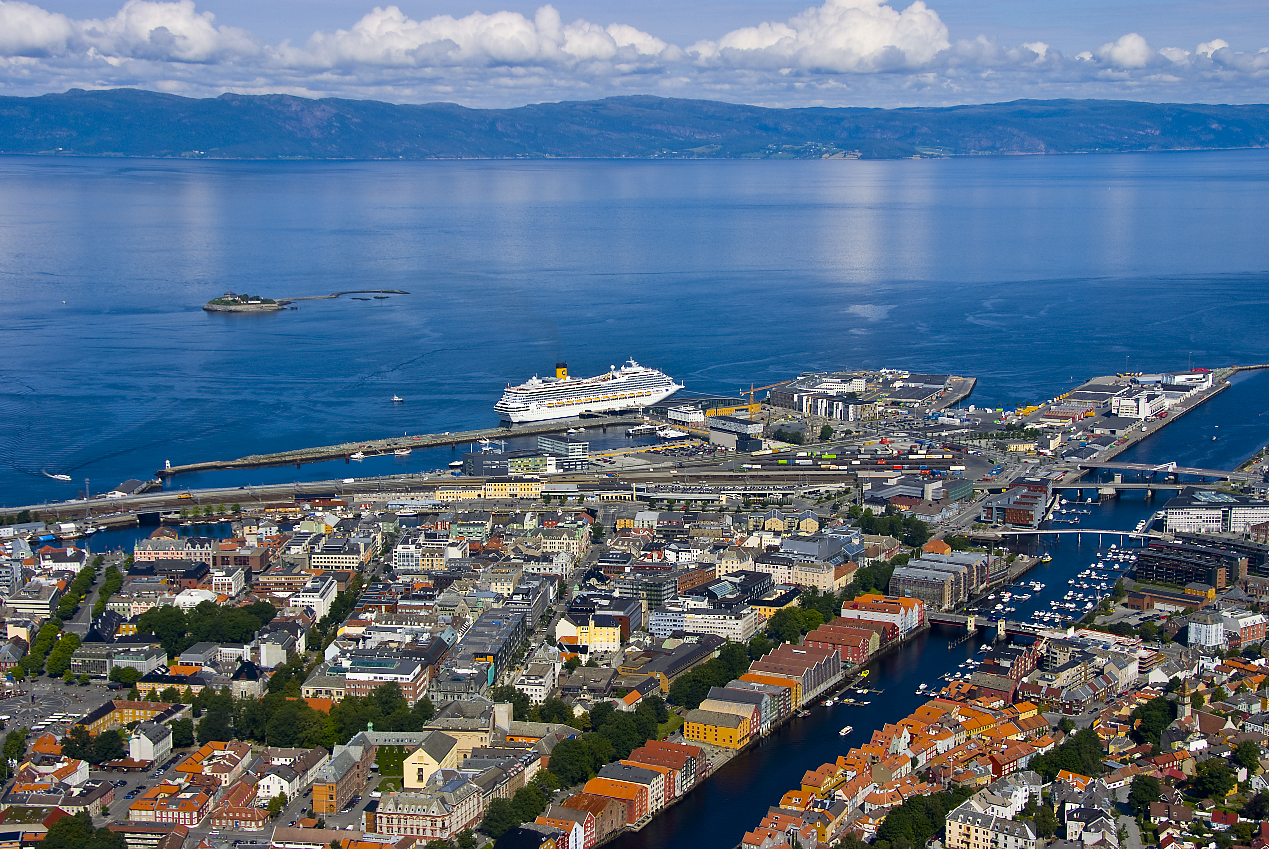 Foto: Trondheim Havn/Åge Hojem